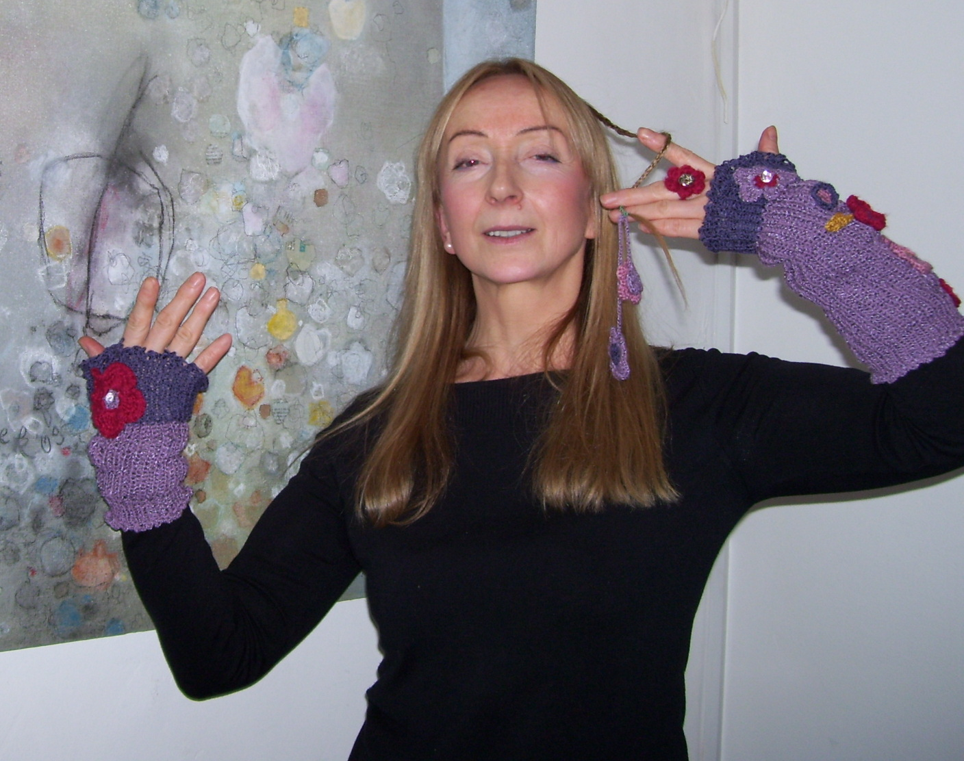 Danuta Joppek; Galeria "Art@gdańsk gallery" Gdańsk 2009 rok